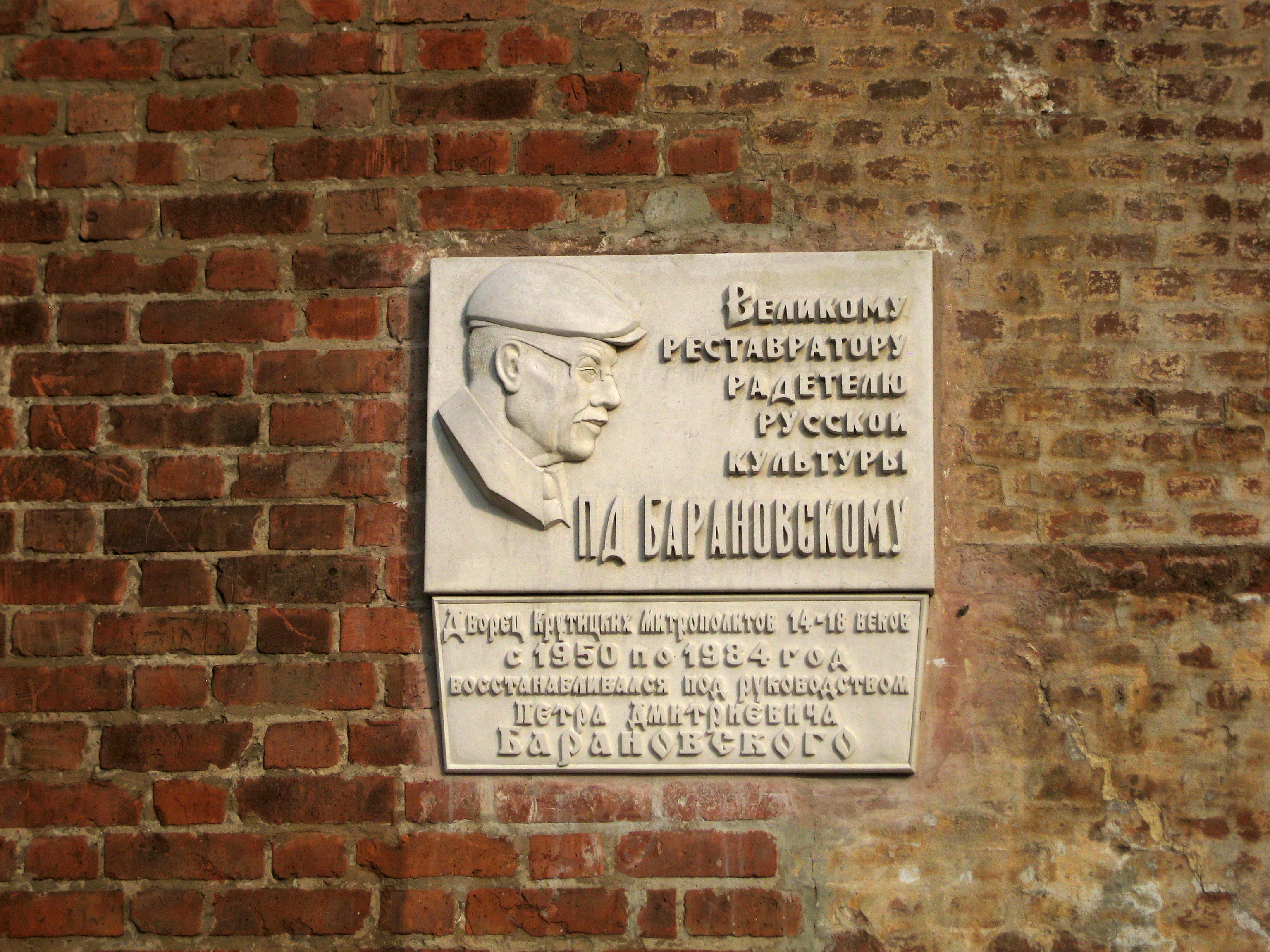 Крутицкое подворье